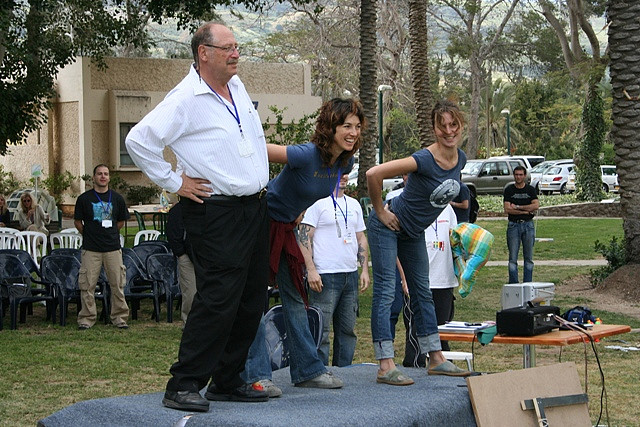 bellydance